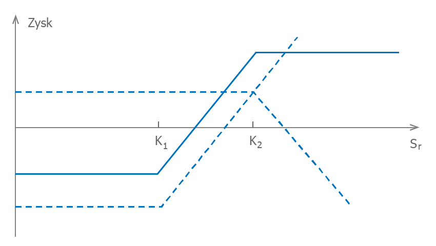 Strategia opcyjna bull spread